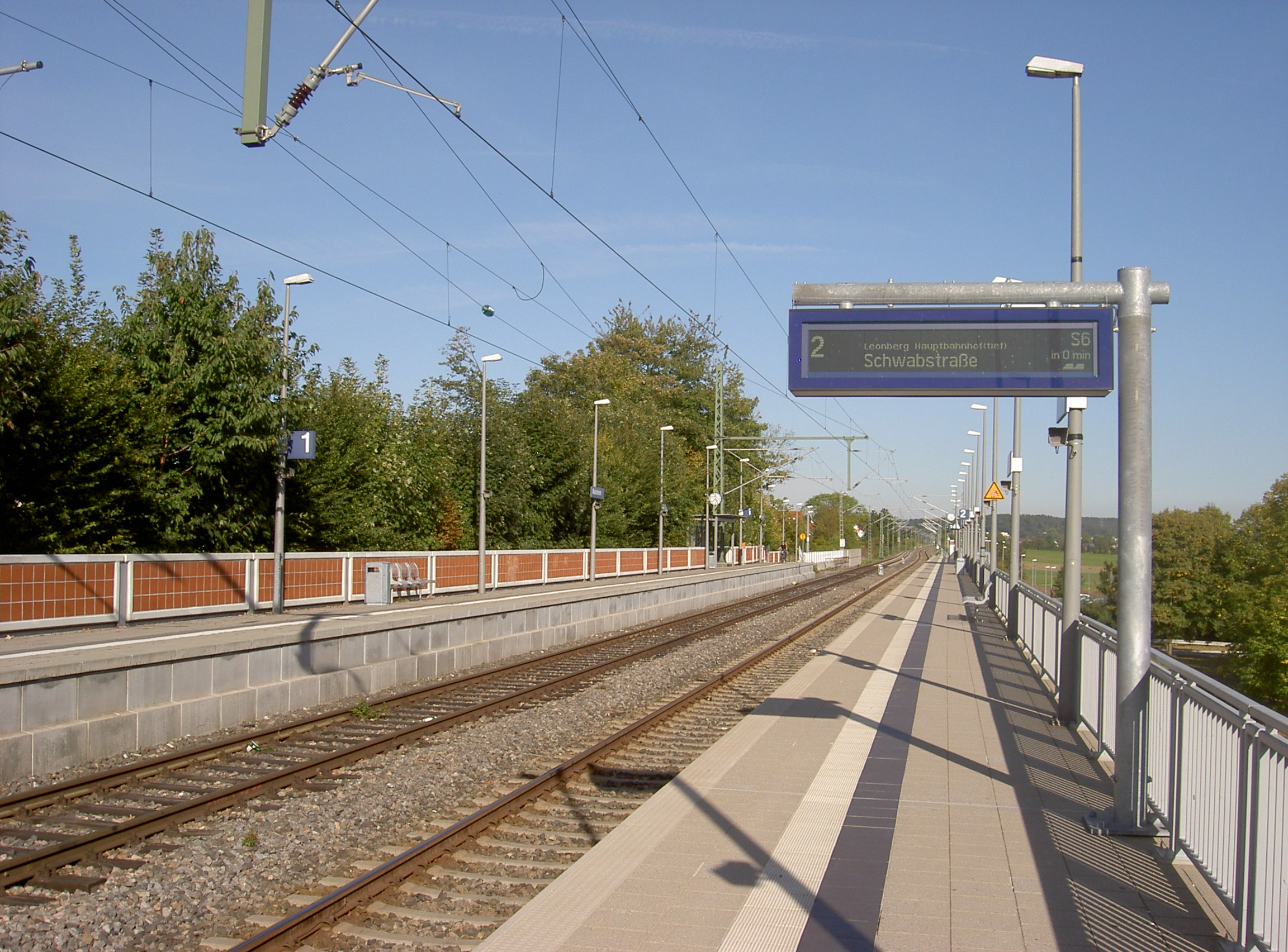 Haltepunkt Malmsheim